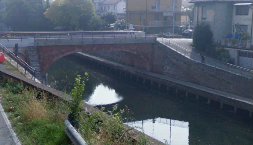 Il ponte sul Naviglio Grande a Pontevecchio (Magenta) - MI - Italy